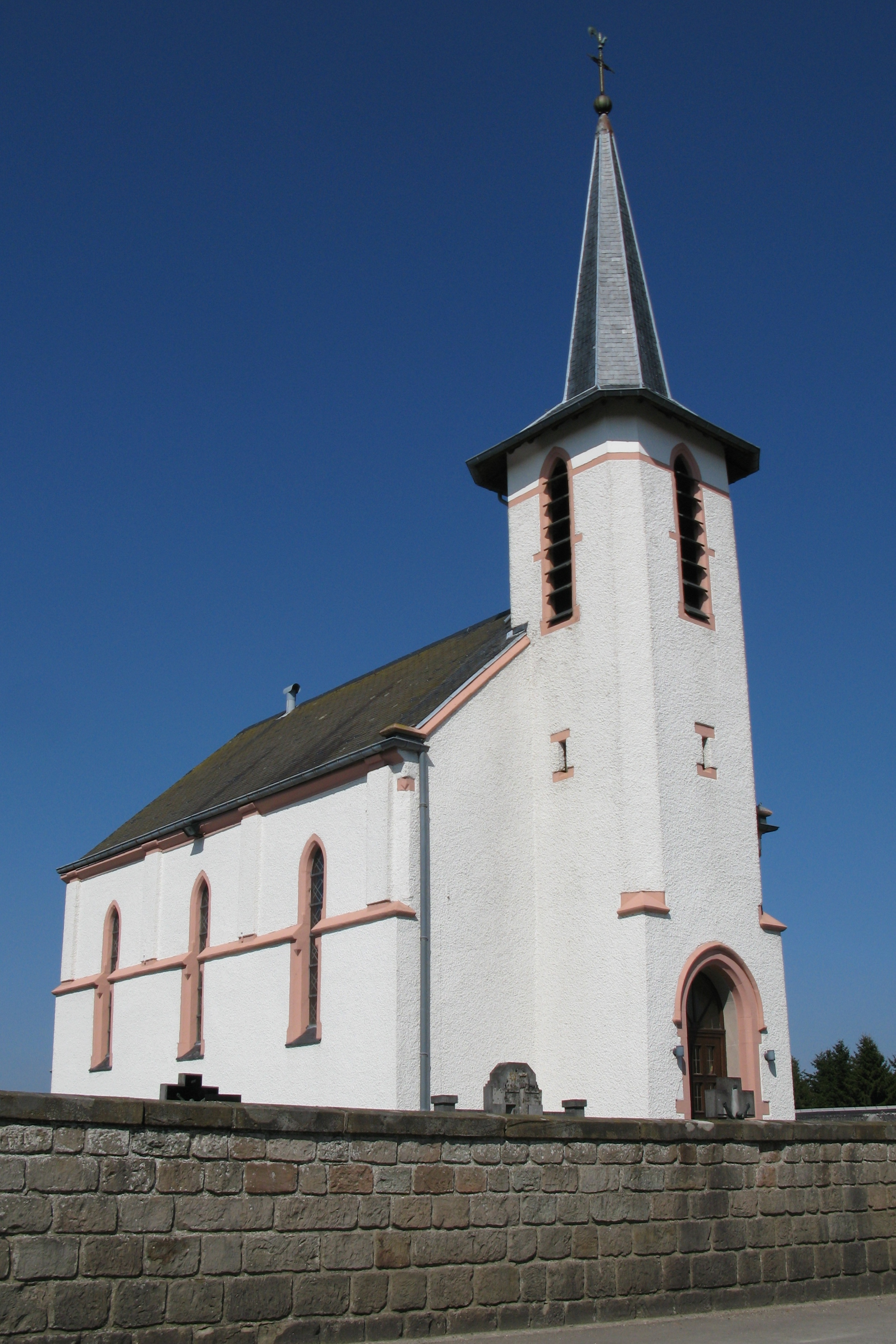 Kierch vu Gréiwels. Kategorie:Gemeng Groussbus Gréiwels